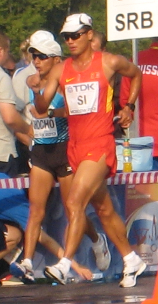 Чемпионат мира по лёгкой атлетике 2013. Ходьба 50 км, мужчины: Китаец Тянфень Си, эквадорец Андрес Чочо